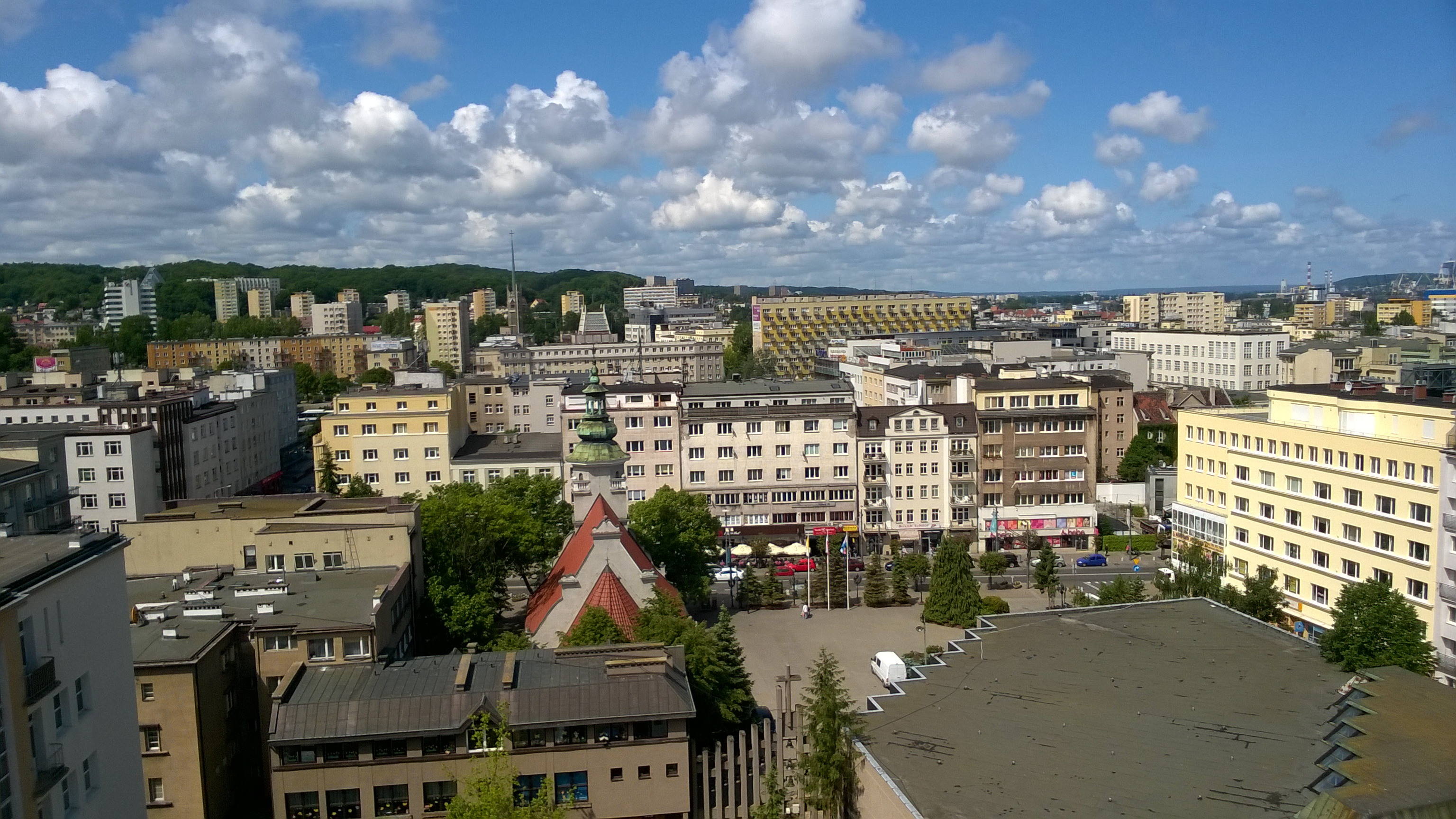 Gdynia Śródmieście - ulica Świętojańska i kolegiata